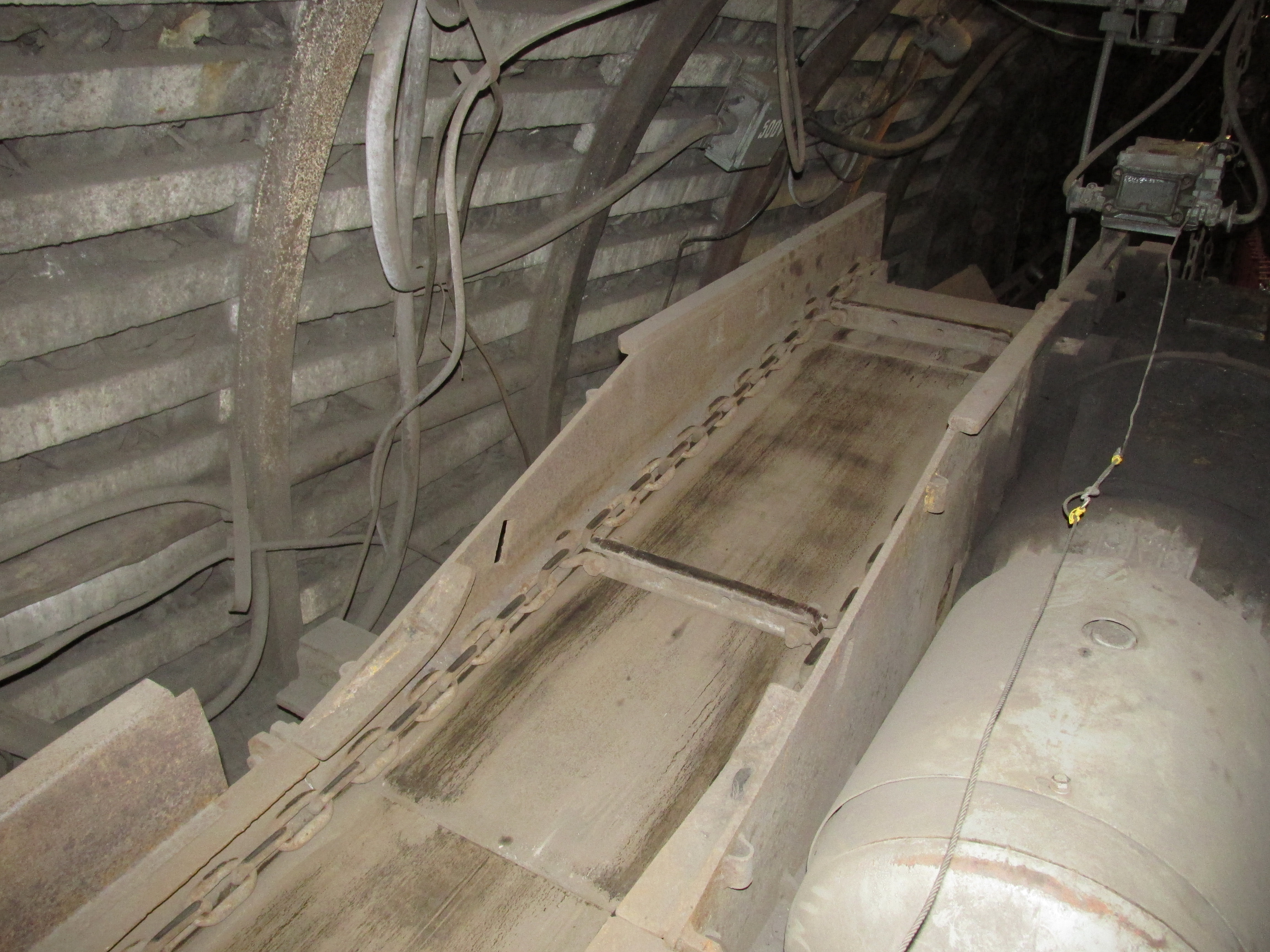 Przenośnik zgrzebłowy podścianowy w kopalni Guido w Zabrzu.